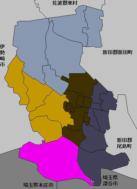 境町の学区。